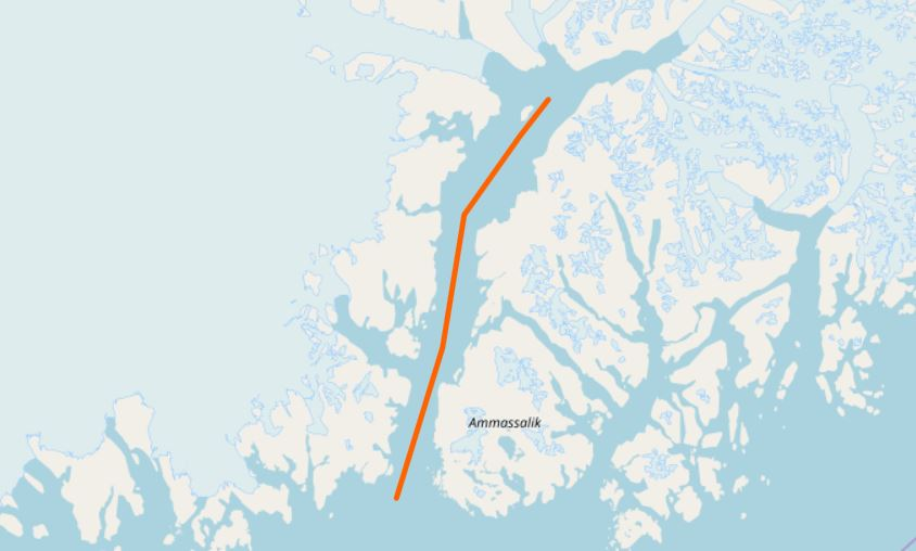 Carte représentant le fjord de Sermilik, district d'Ammassalik, municipalité de Sermersooq, ici à gauche de l'île d'Ammassalik, dans le sud-est du Groenland.